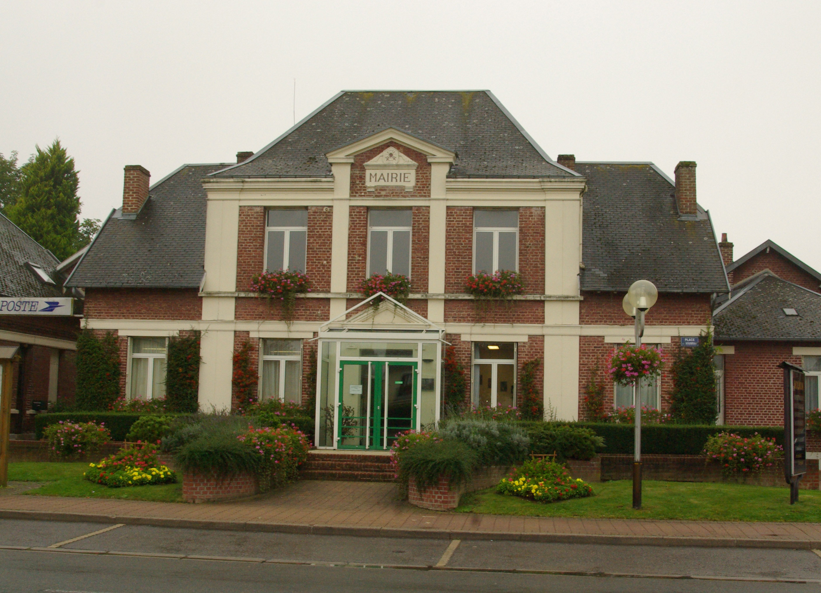 Mairie d'Holnon